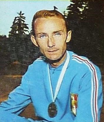 Jean Wadoux en 1971 (vice-champion d'Europe du 5 000 m), 'Munchen 72', Panini figurina n°80.